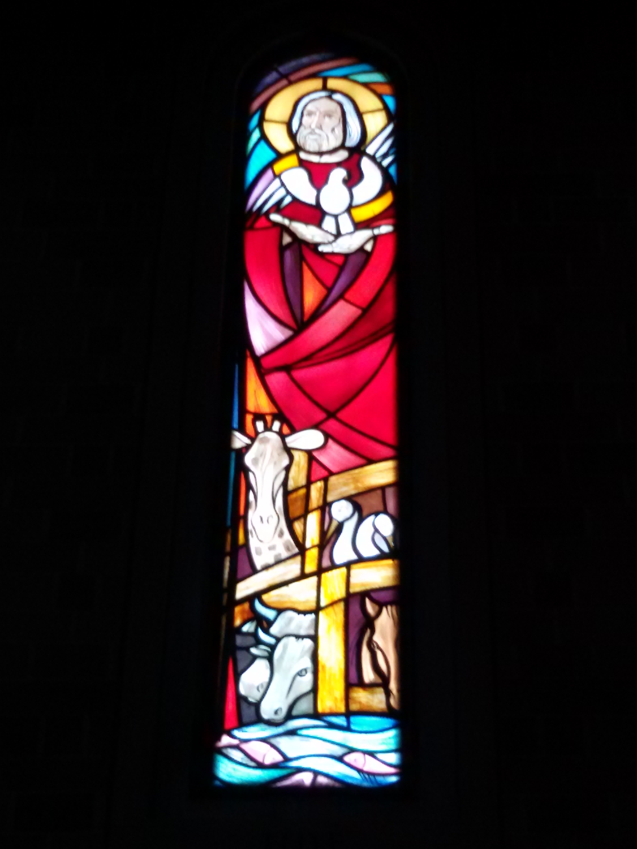 vetrata